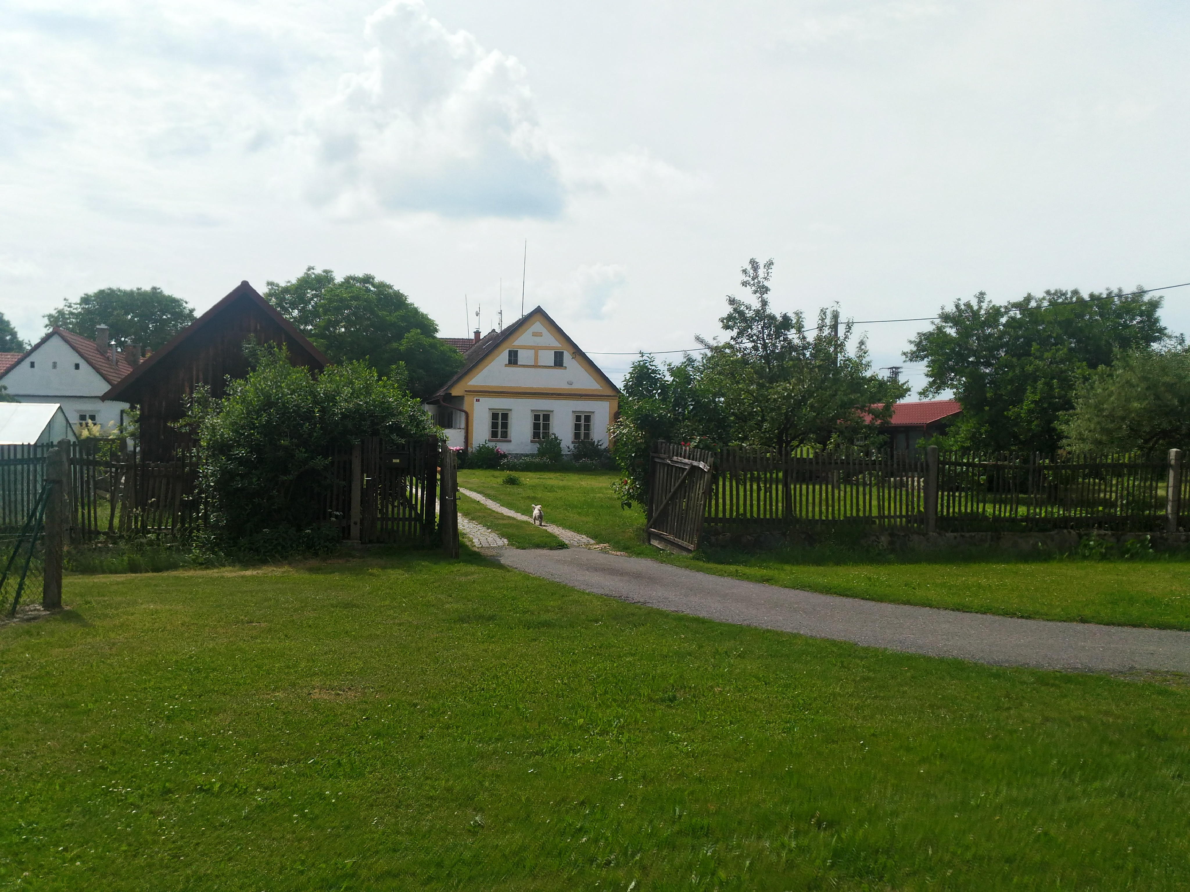 Balkova Lhota, okres Tábor, Česká republika